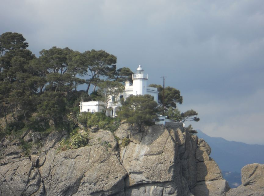 Faro di Portofino.